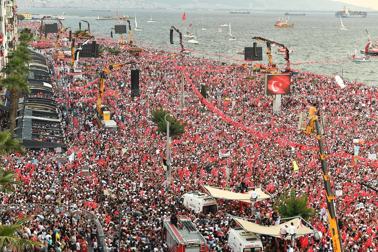 Foule à Izmir le 21 juin 2018